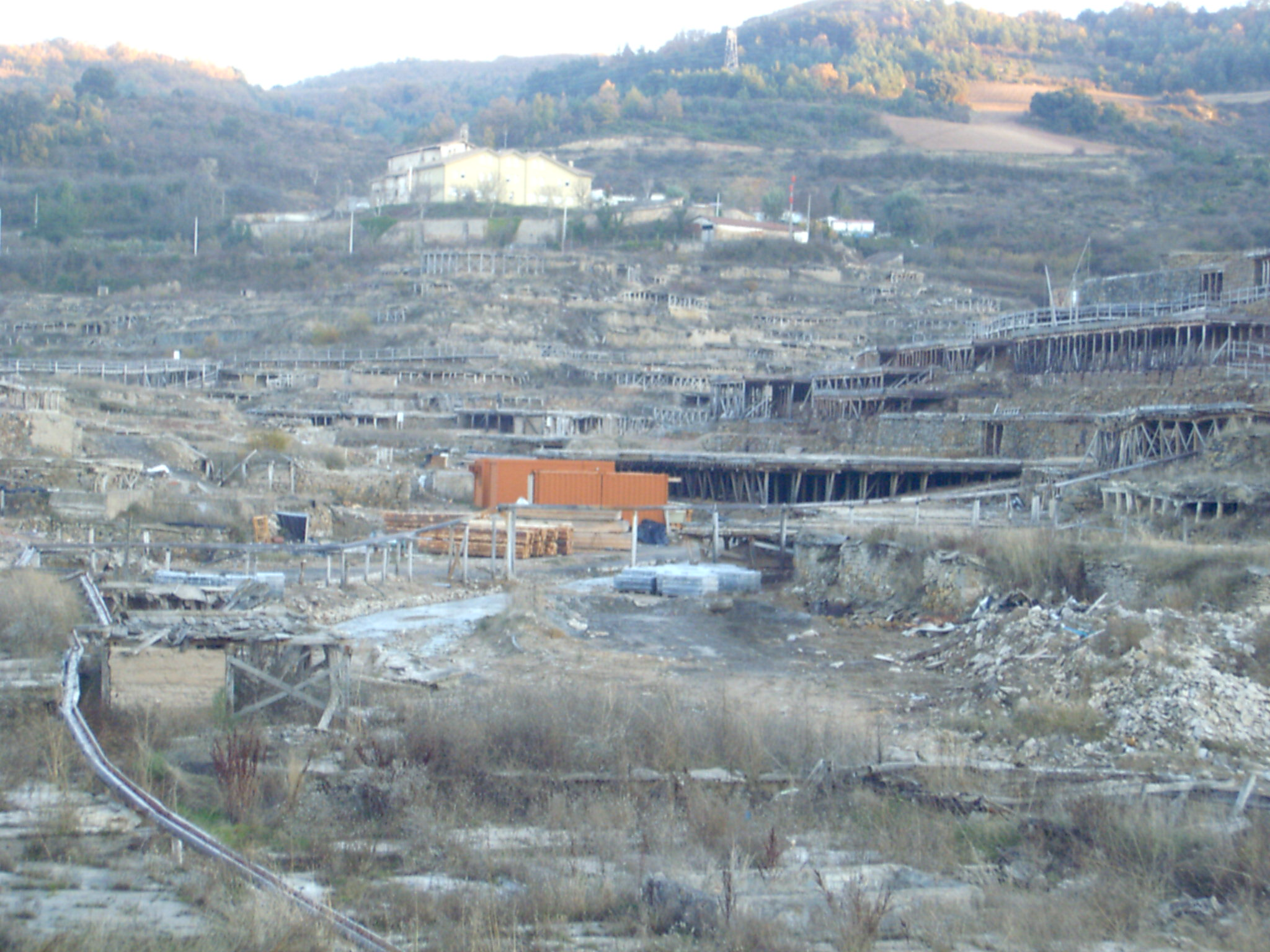 Gesaltza Añanako gatz-larrainen zaharberritze lanak 2007ko azaroan.